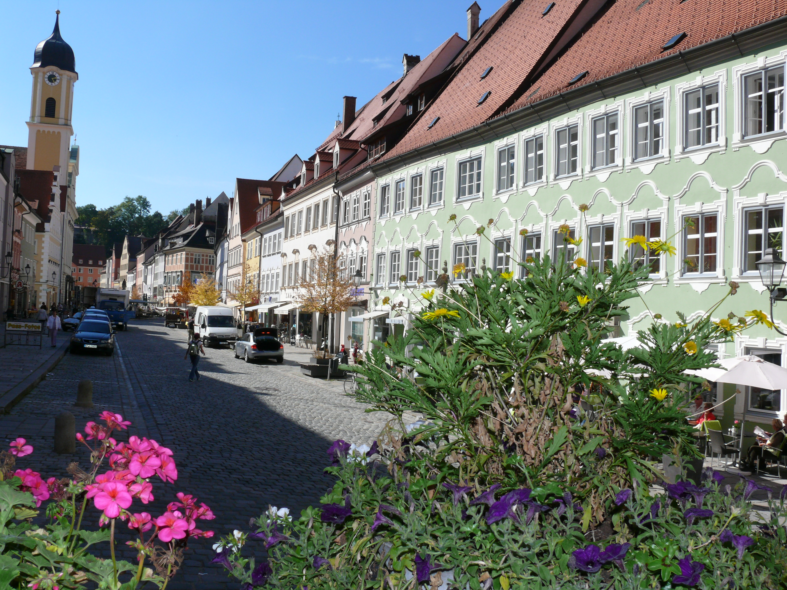 Blick vom Rathaus in die Kaiser-Max-Straße